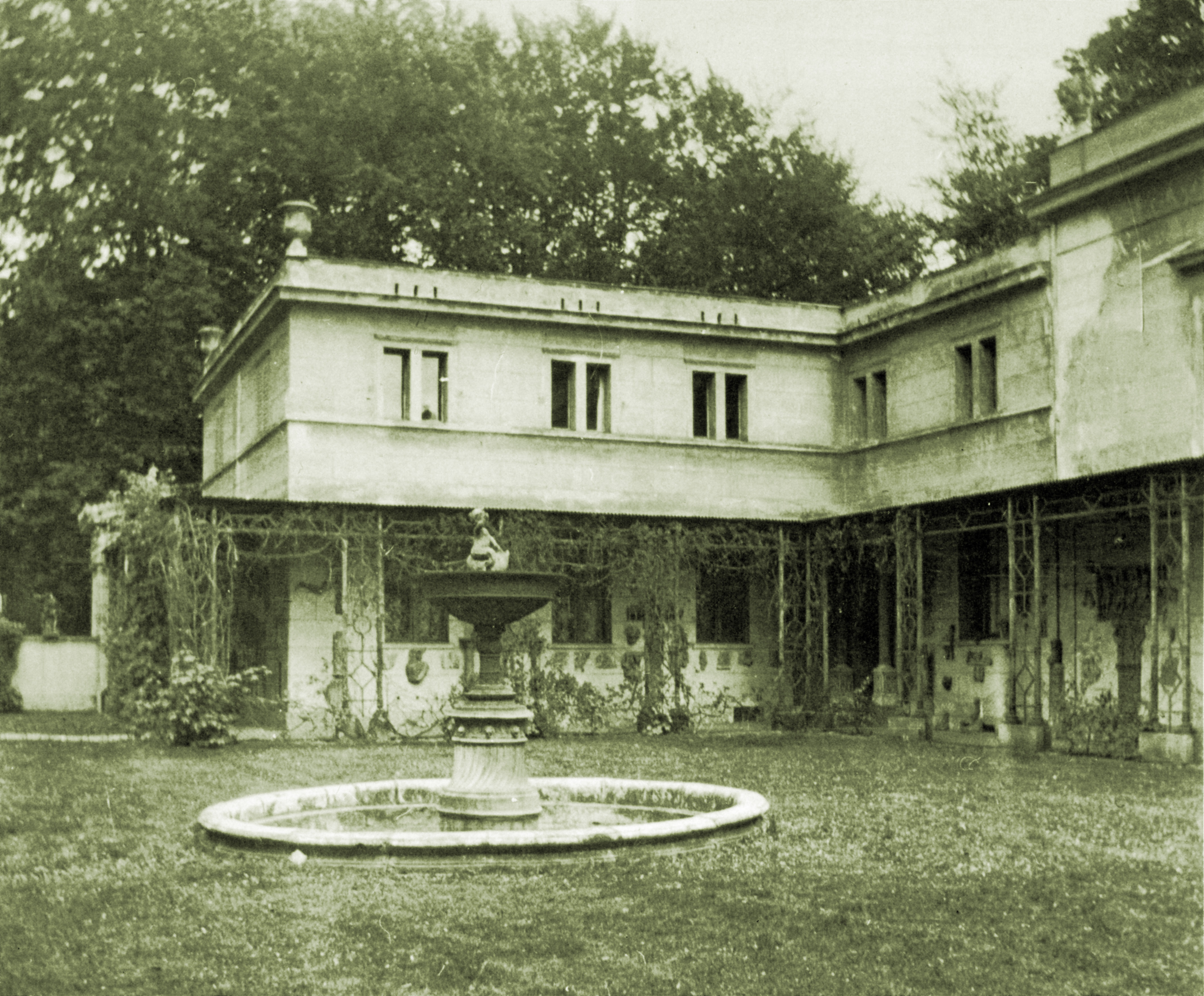 Blick über den Renaissance-Schalenbrunnen auf den Hofdamenflügel und den Pergola-Eingang (Foto um 1900)